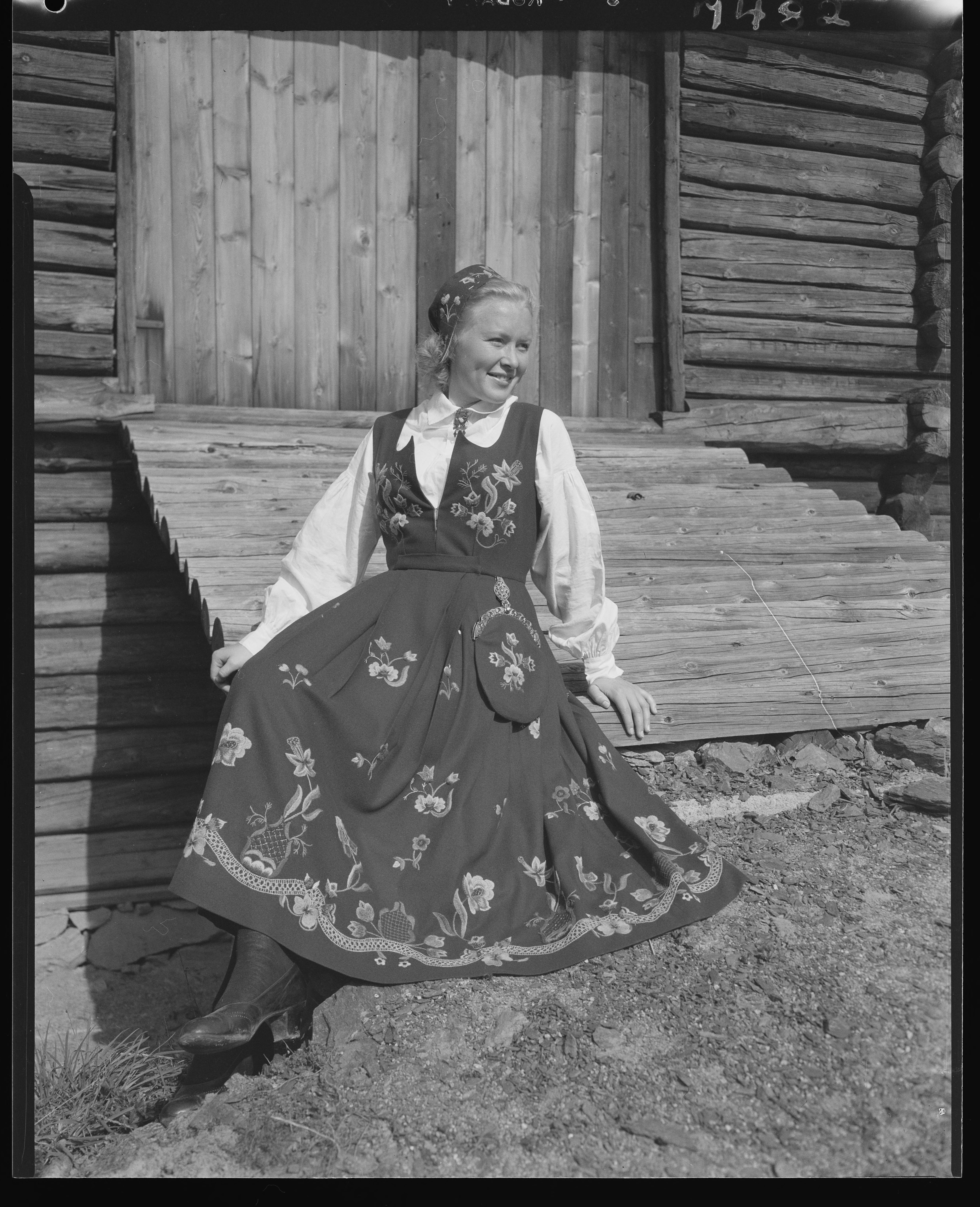 Bildet er hentet fra Nasjonalbibliotekets bildesamling. Anmerkninger til bildet var: Fotograf : ukjent